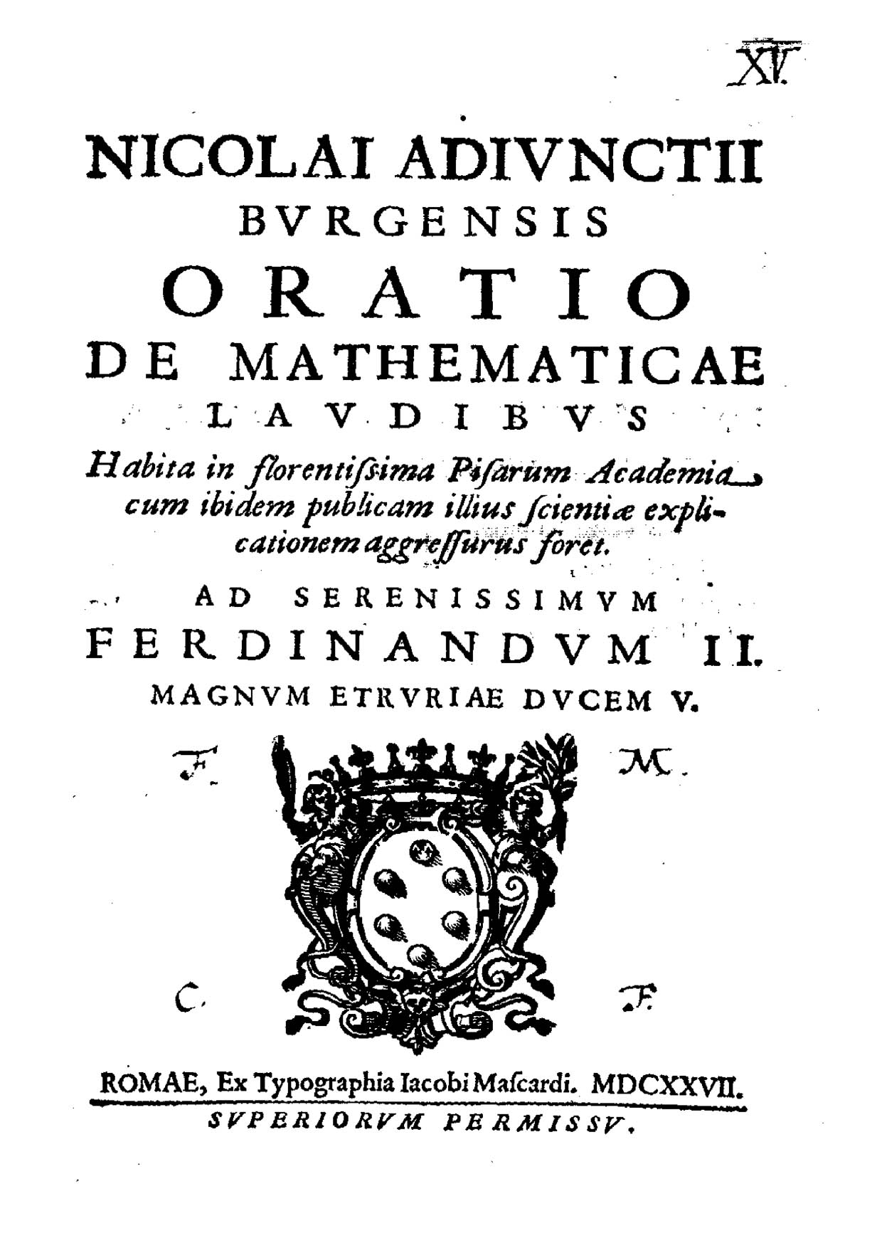 Nicolai Adiunctii Bugensis Oratio de mathematicae laudibus habita in florentissima Pisarum academia ... ad serenissimum Ferdinandum 2. magnum Etruriae ducem 5. - Romae : ex typographia Iacobi Mascardi, 1627. - 34, [2] p. ; 4º. - Esemplare mutilo dell'ultima c. bianca .